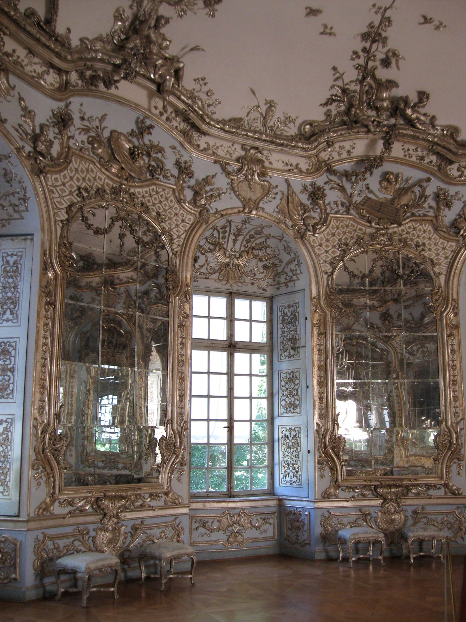 Amalienburg im Schlosspark Nymphenburg (München): Spiegelsaal